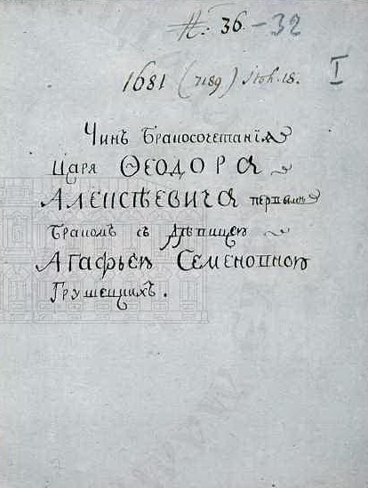 РГАДА (Российский государственный архив древних актов). Ф. 135, "Государственное древлехранилище хартий и рукописей". Отд. IV. Рубрика II. Ед. хр. 32. Чиновный список свадьбы царя Федора Алексеевича с Агафьей Семеновной Грушецкой, дочерью дворянина Сем. Федор. Грушецкого. 1680 г. июля 17-19. Титульный лист.